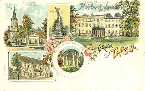 Dąbroszyn - pocztówka z przełomu XIX i XX wieku)